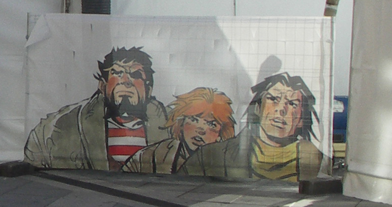 Lateral de la carpa I Salón del cómic, Ávila